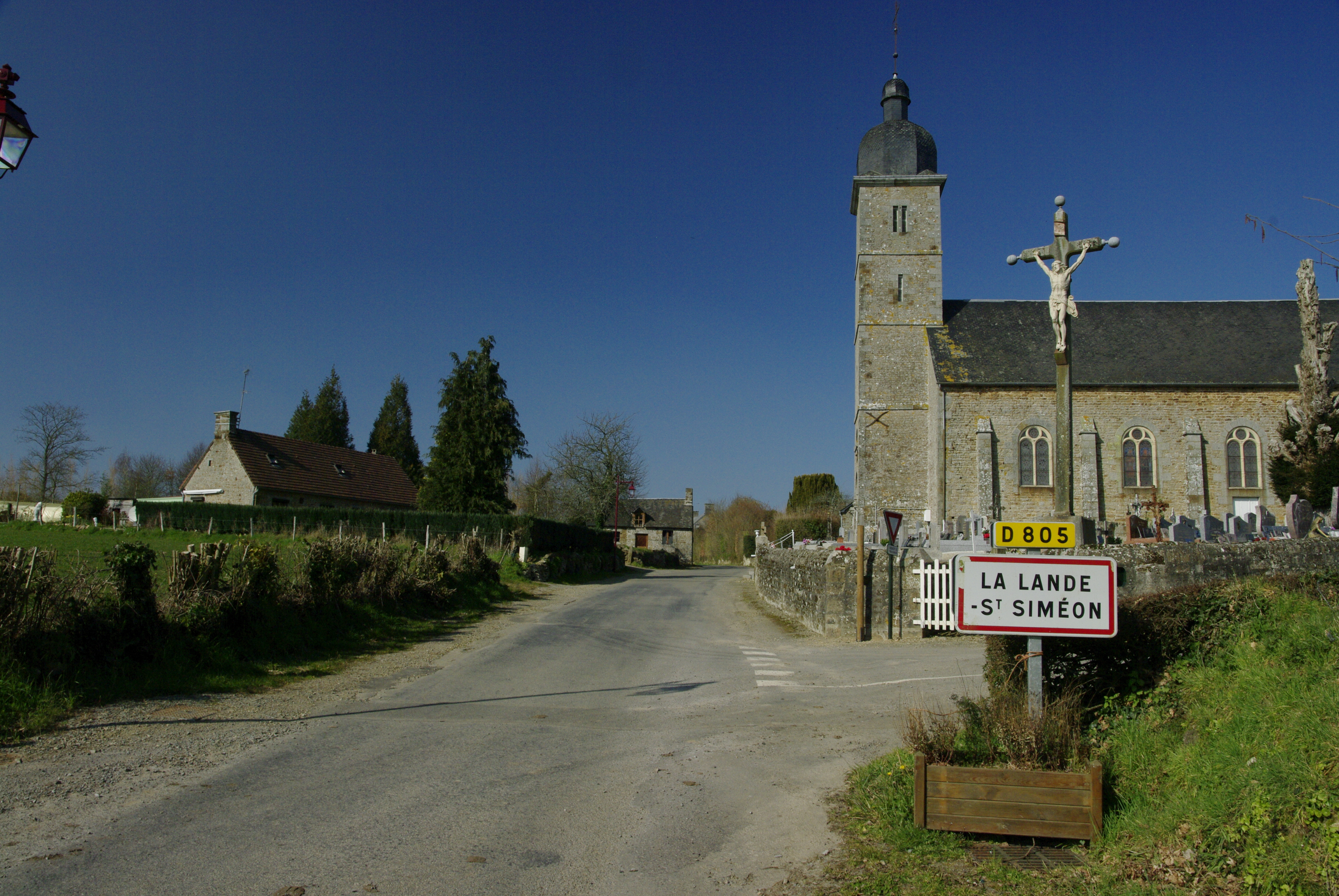 Entrée du village de La Lande-St Simeon, Orne.